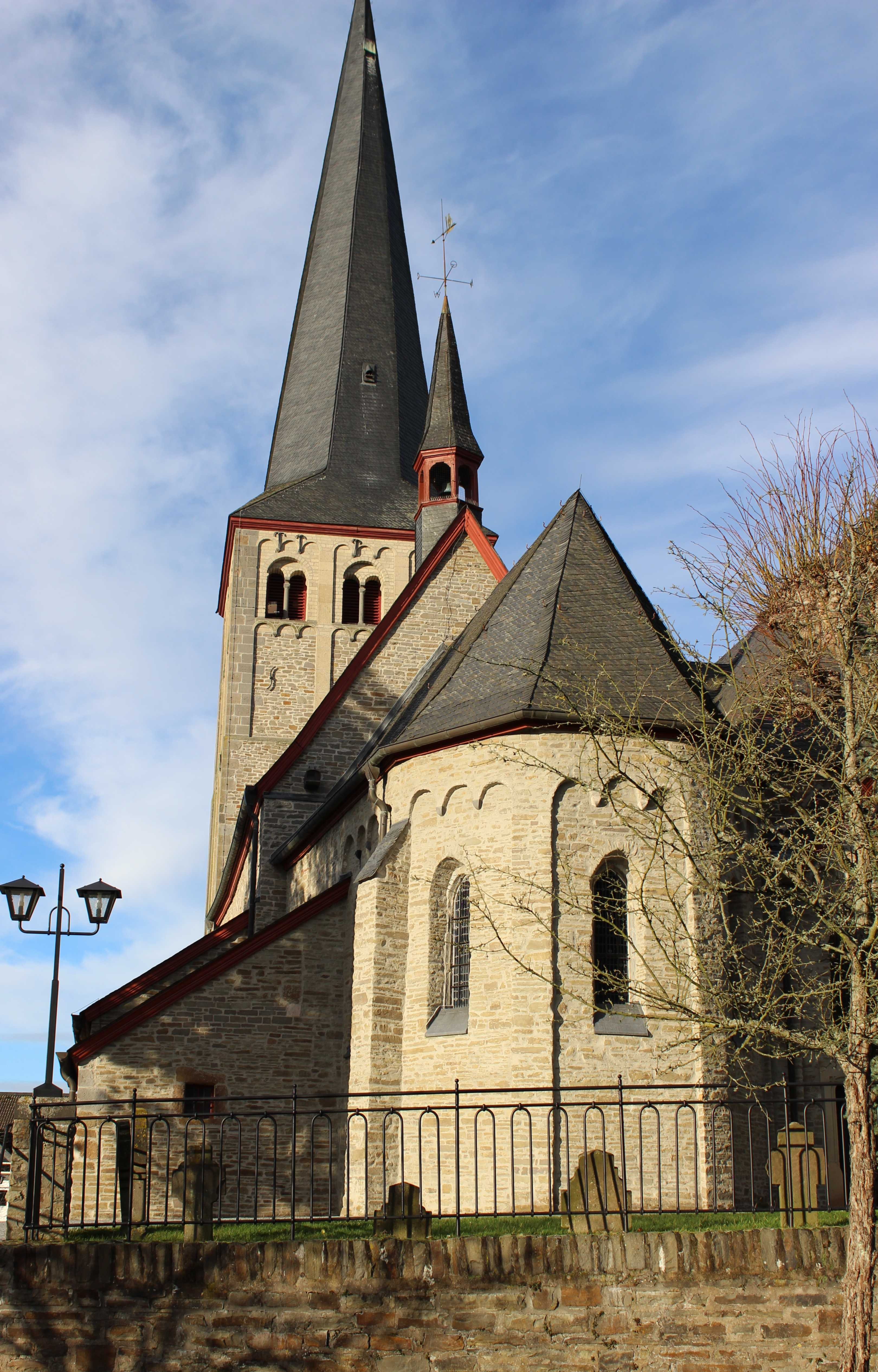 Saint Margareta Neunkirchen-outside view from east 2